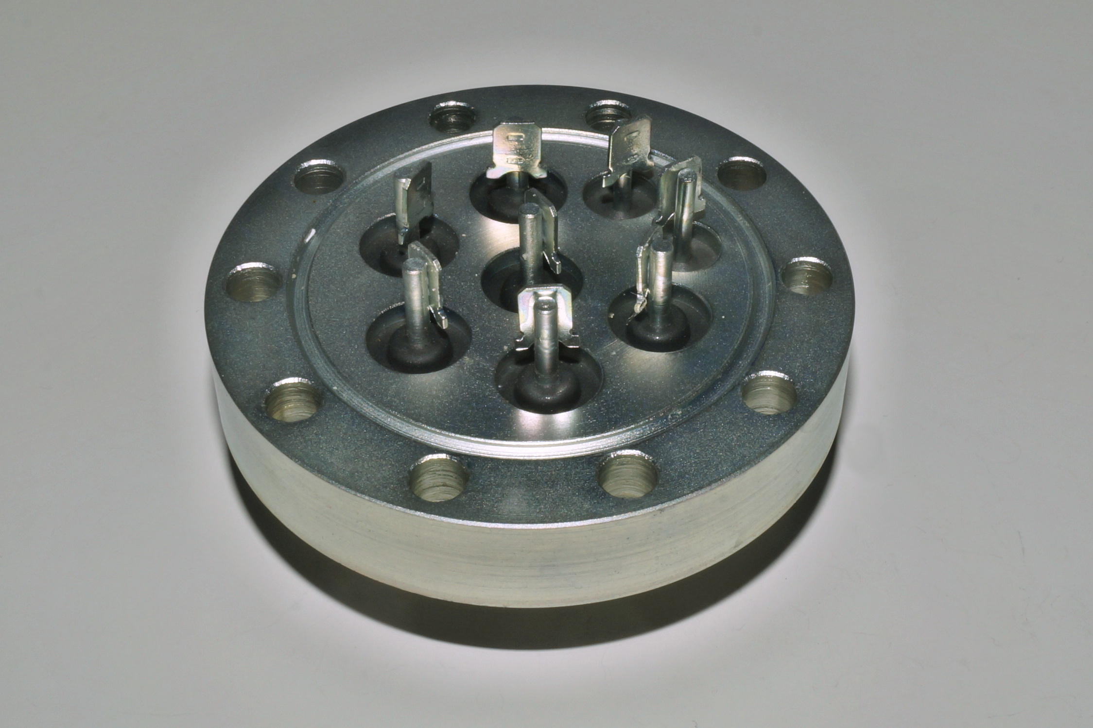 Vícepólová průchodka (tlakový zátav kovu a skla) pro polohermetický kompresor